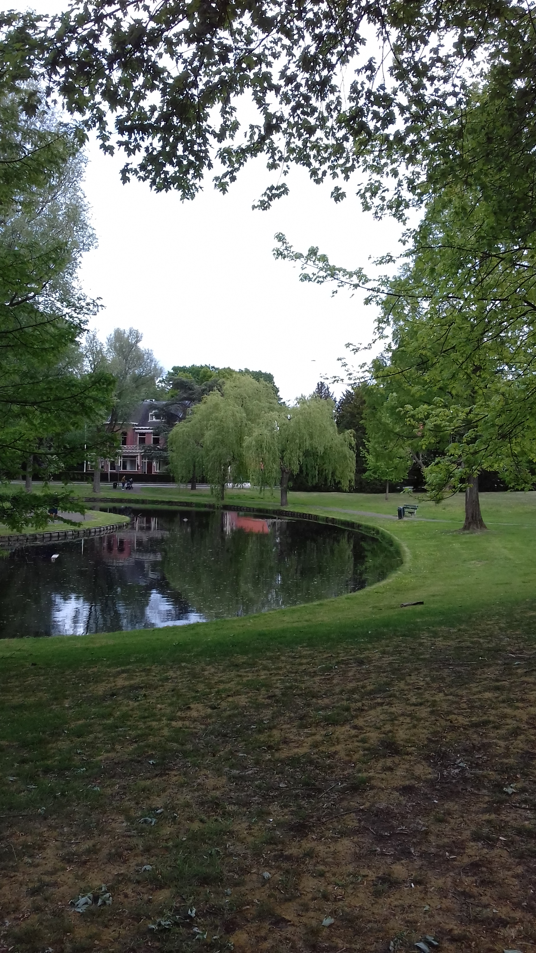 gezien naar oostkant, kom van Biegel, het Spiegel Bussum